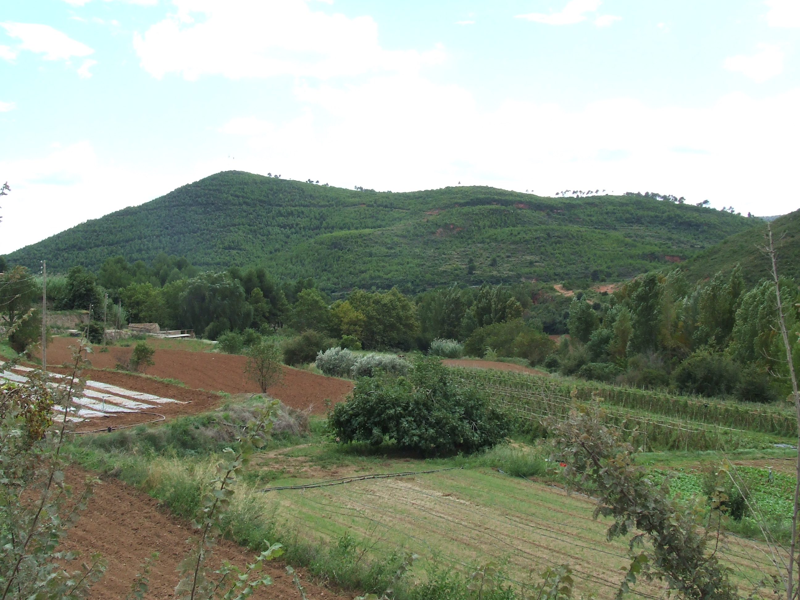 El Serrat de les Fargues (Bigues i Riells, Vallès Oriental)